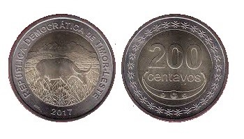 200 centavos de Timor-Leste